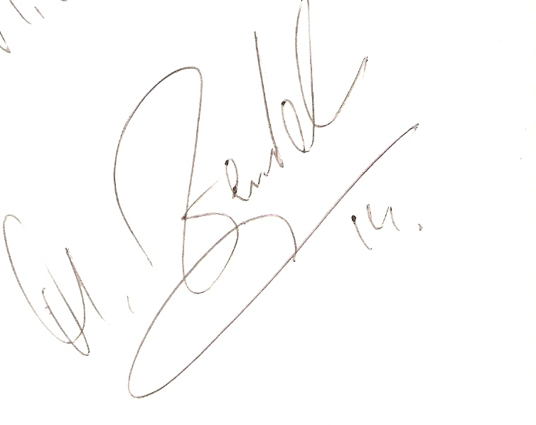 Autograf Michała Żewłakowa